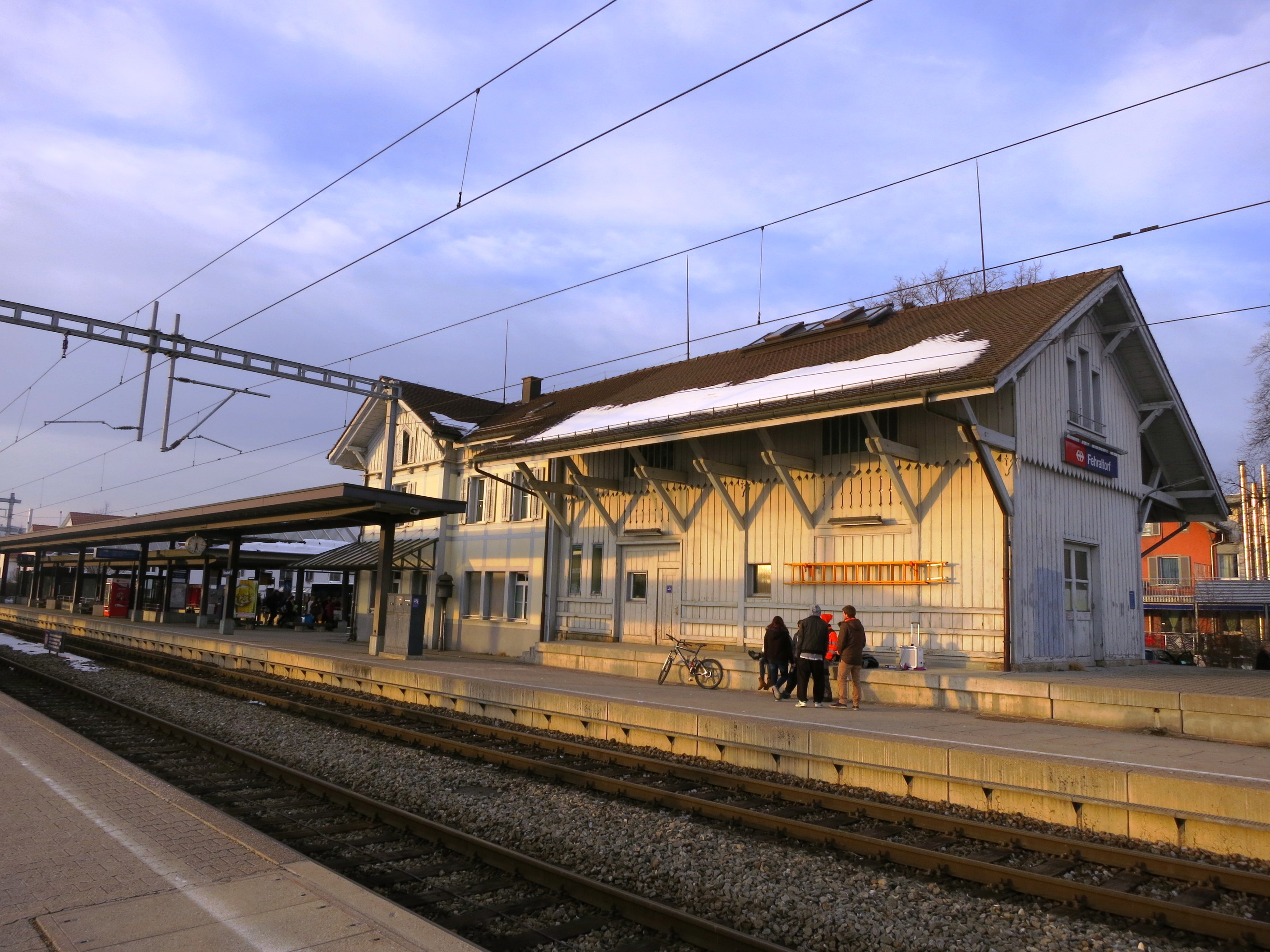 Bahnhof Fehraltorf ZH, Schweiz